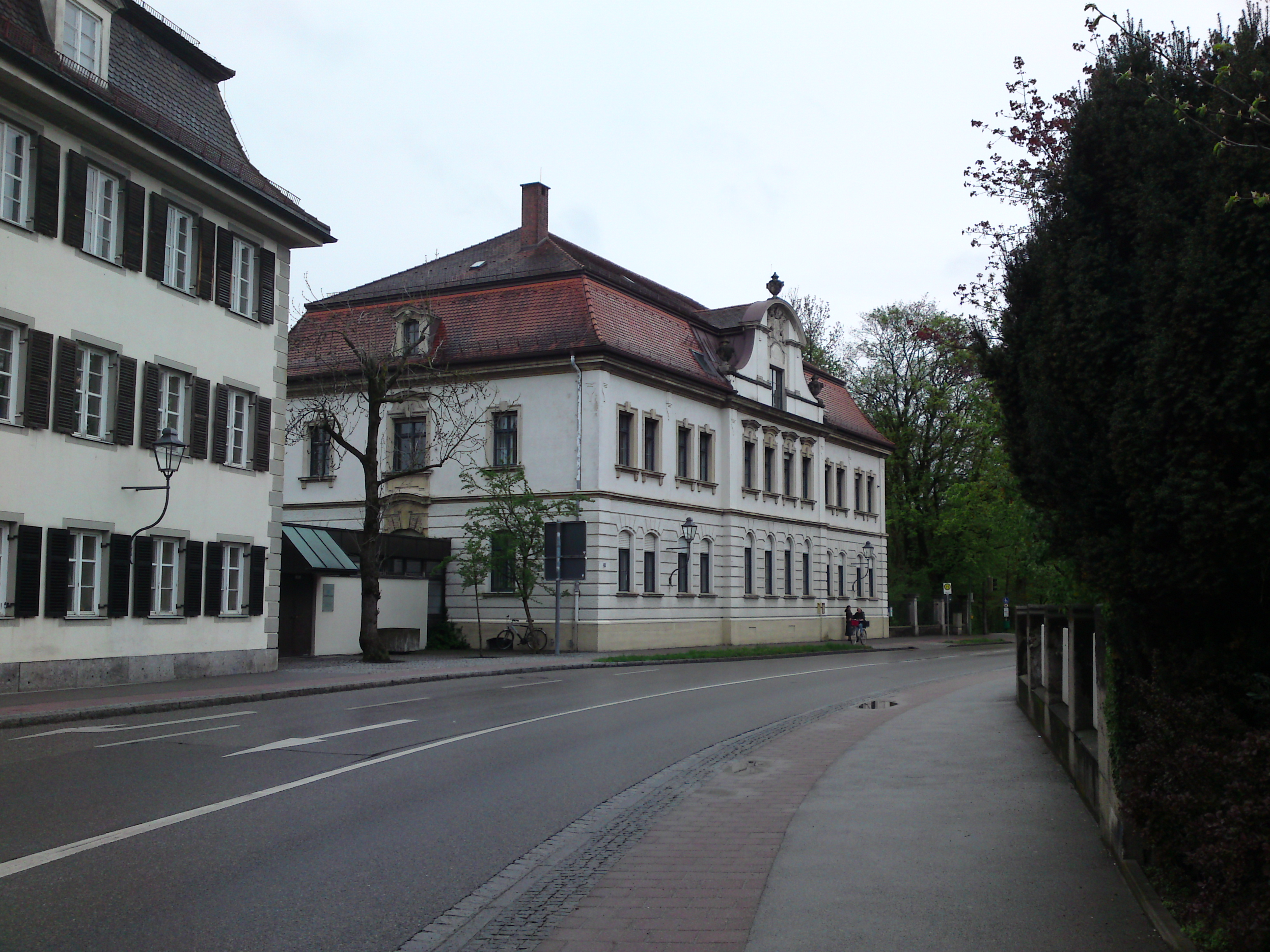 Amtsgericht Kaufbeuren in der Ganghofer Straße